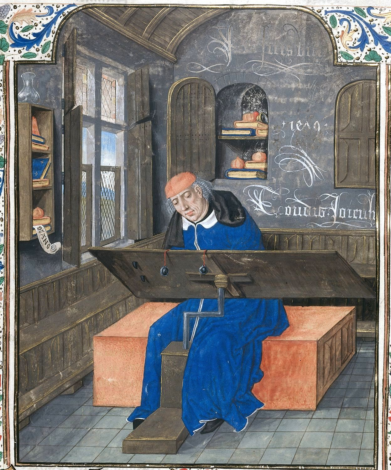 Miniature du traducteur, Simon de Hesdin, au travail dans son étude. L’inscription blanche sur le mur se lit « Je suis bien / Toudis Joieulx », et la date « 1479 ». Le mot « anno » est inscrit sur une banderolle qui sort d’un étagère. Début du livre 1